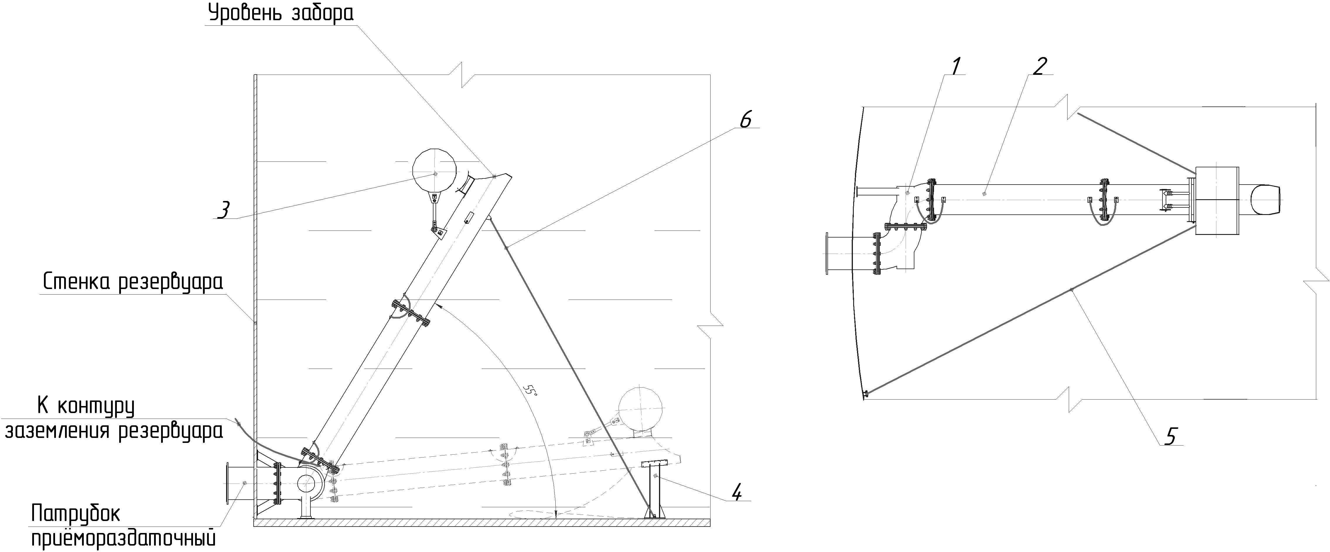 Плавающее заборное устройство производства ООО "СЗНРО"